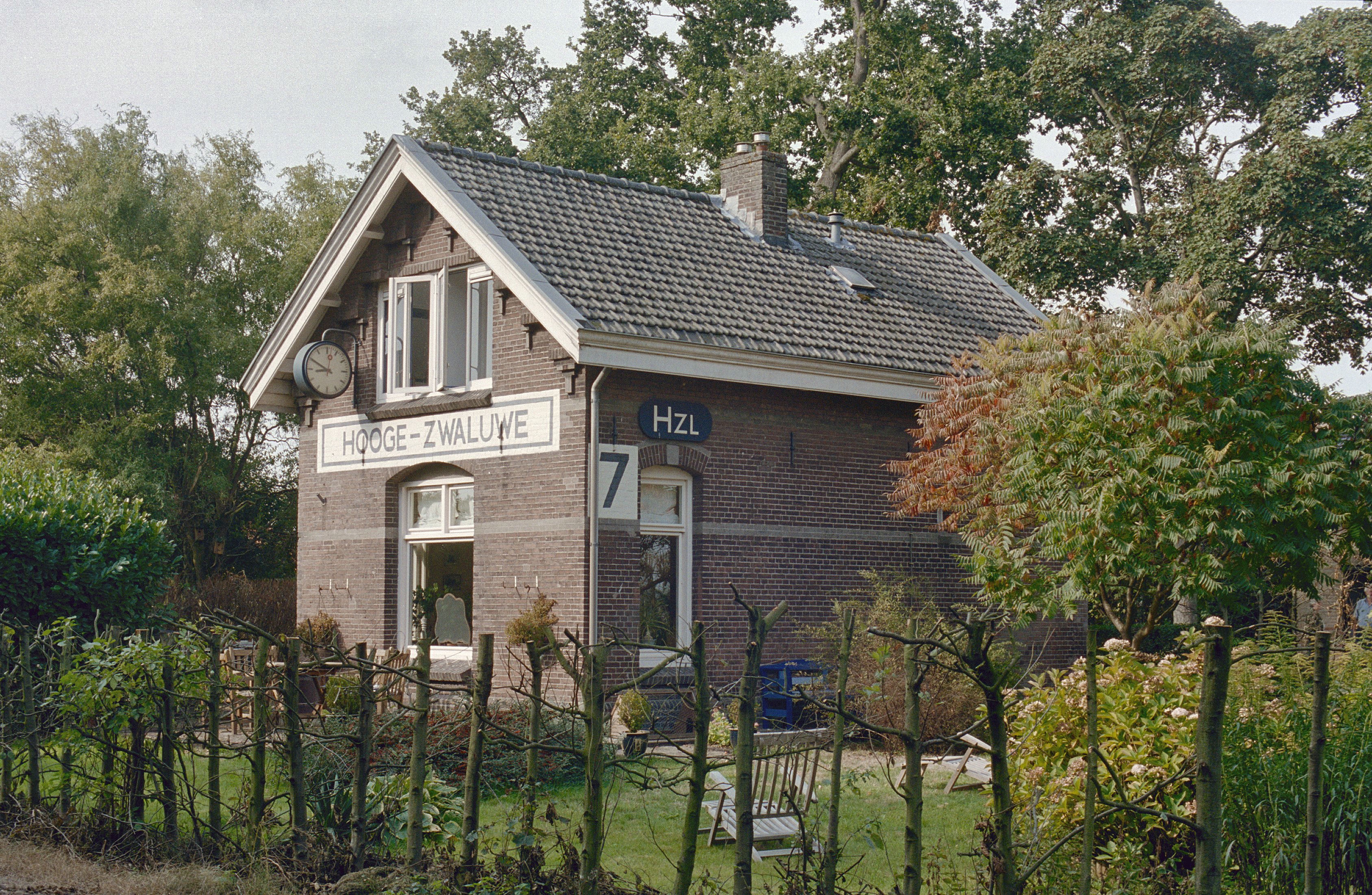 Voormalig Stationsgebouw: Overzicht v.m. stationsgebouw